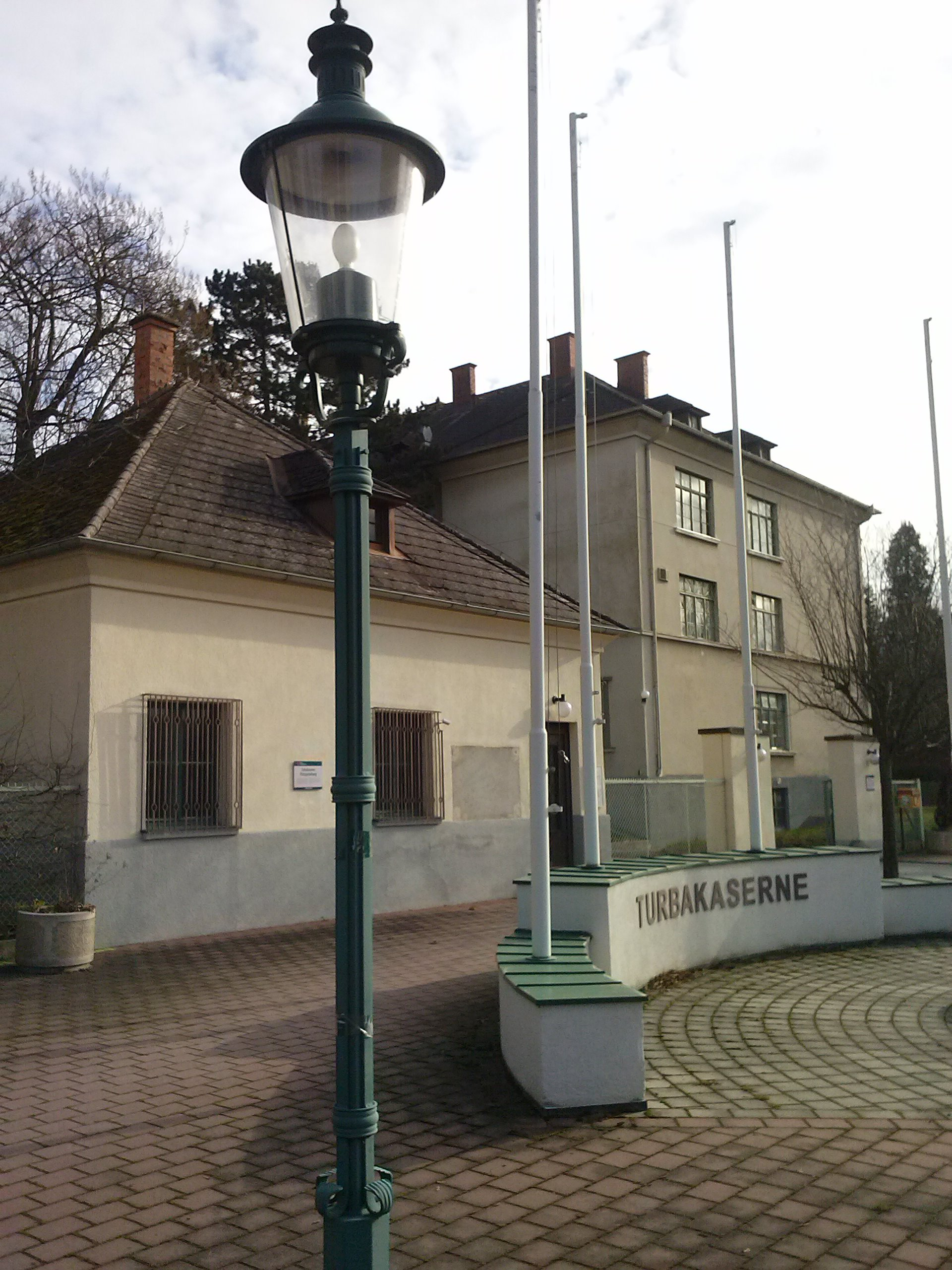 Eingangstor Turbakaserne Pinkafeld